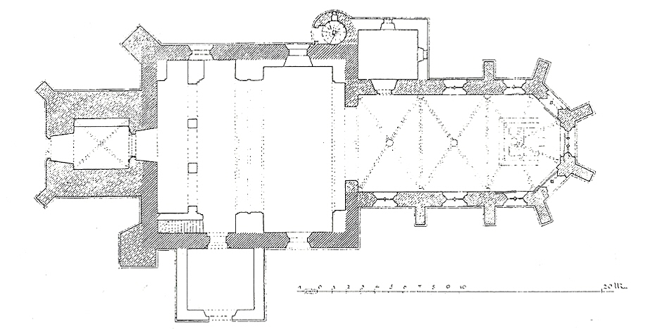 půdorys gotického kostela v Charvatcích